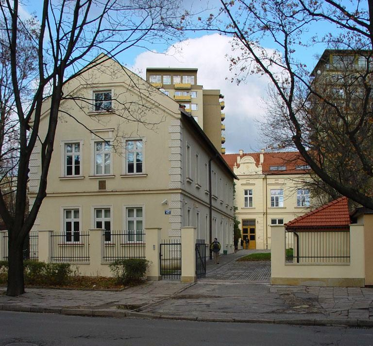 Zespół budynków Wydziału Sztuki i Instytutu Filozofii i Socjologii Uniwersytetu Pedagogicznego im. KEN przy ul. Mazowieckiej 43 w Krakowie, zbudowane w 1903 roku.